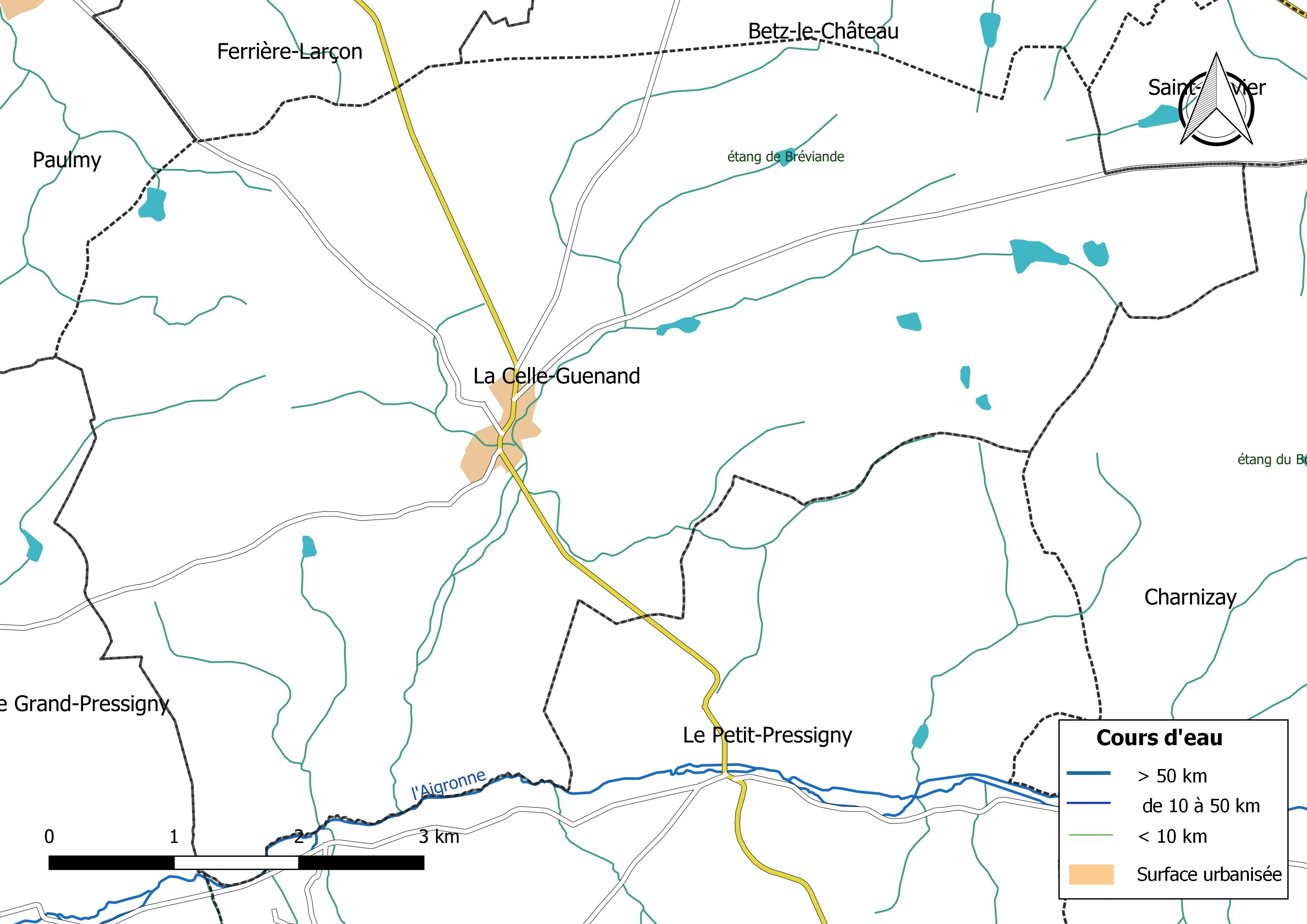 Carte du réseau hydrographique de la commune de La Celle-Guenand (France).